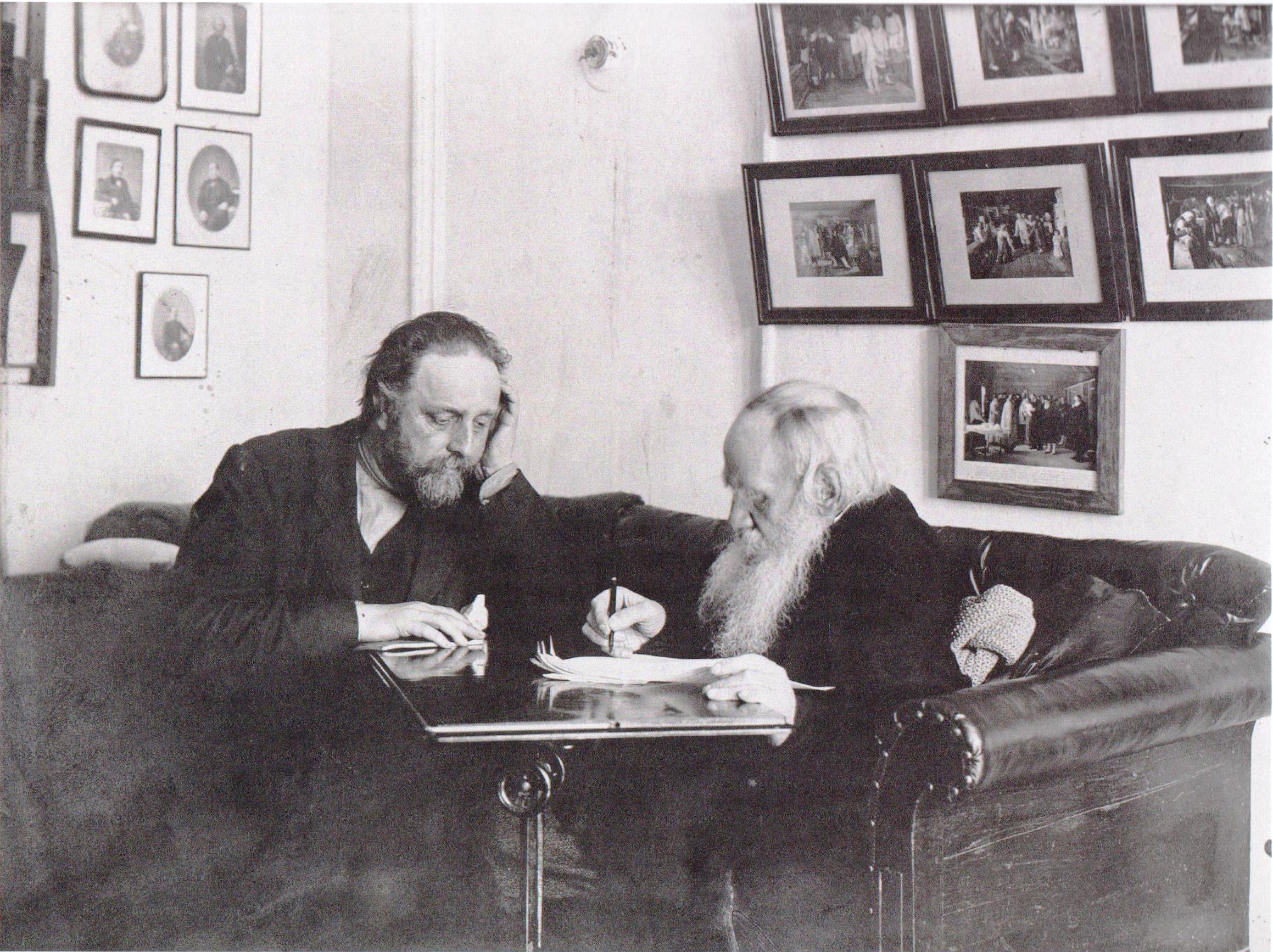 Л. Н. Толстой и В. Г. Чертков. Ясная Поляна. 29 марта 1909 г.